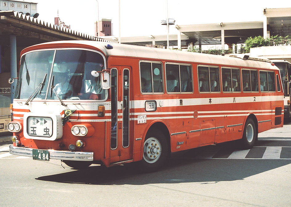 熊本バス 三菱ふそうB806L 西工車体